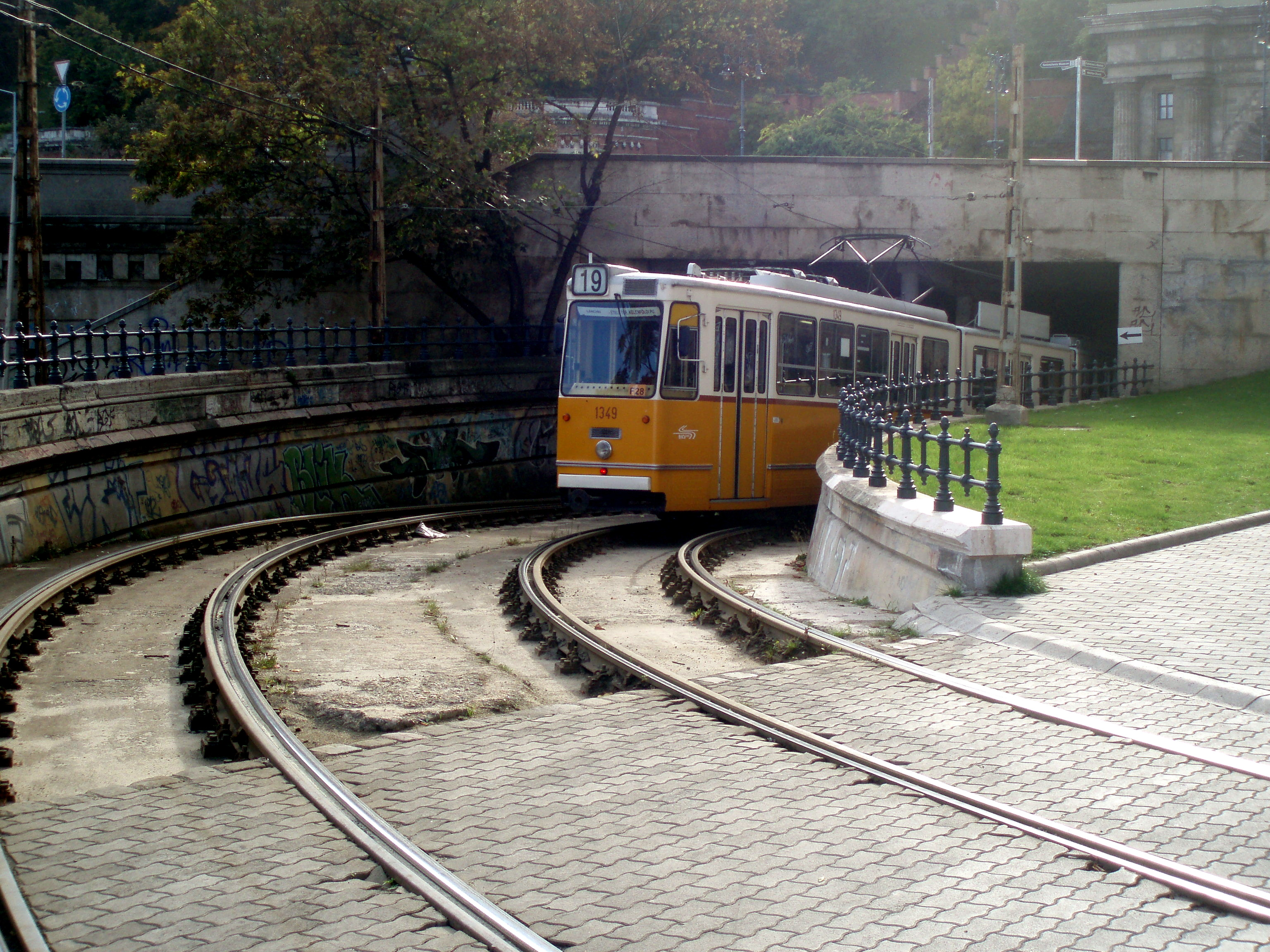 A 19-es villamos a Lánchídnál